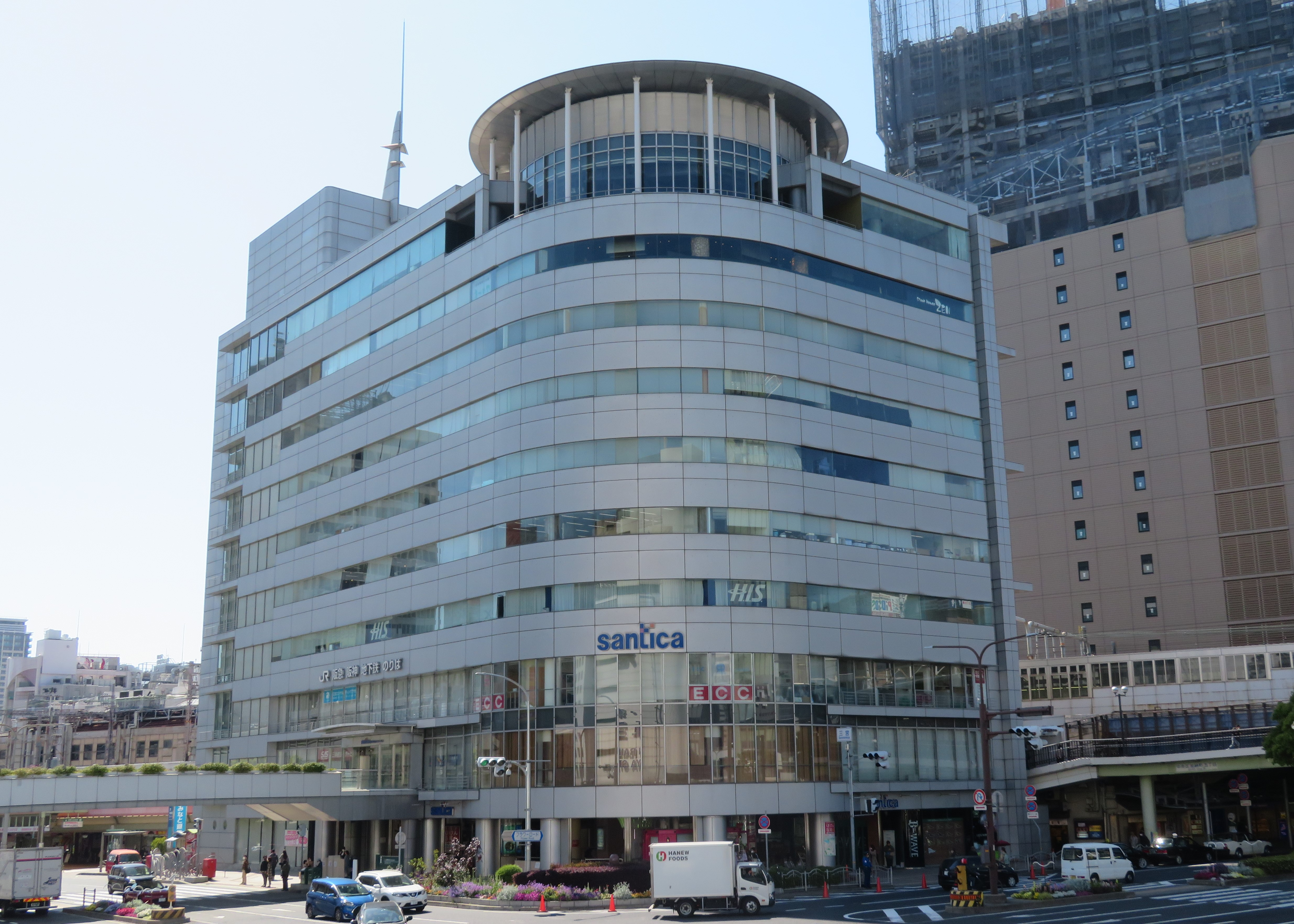 神戸交通センタービル